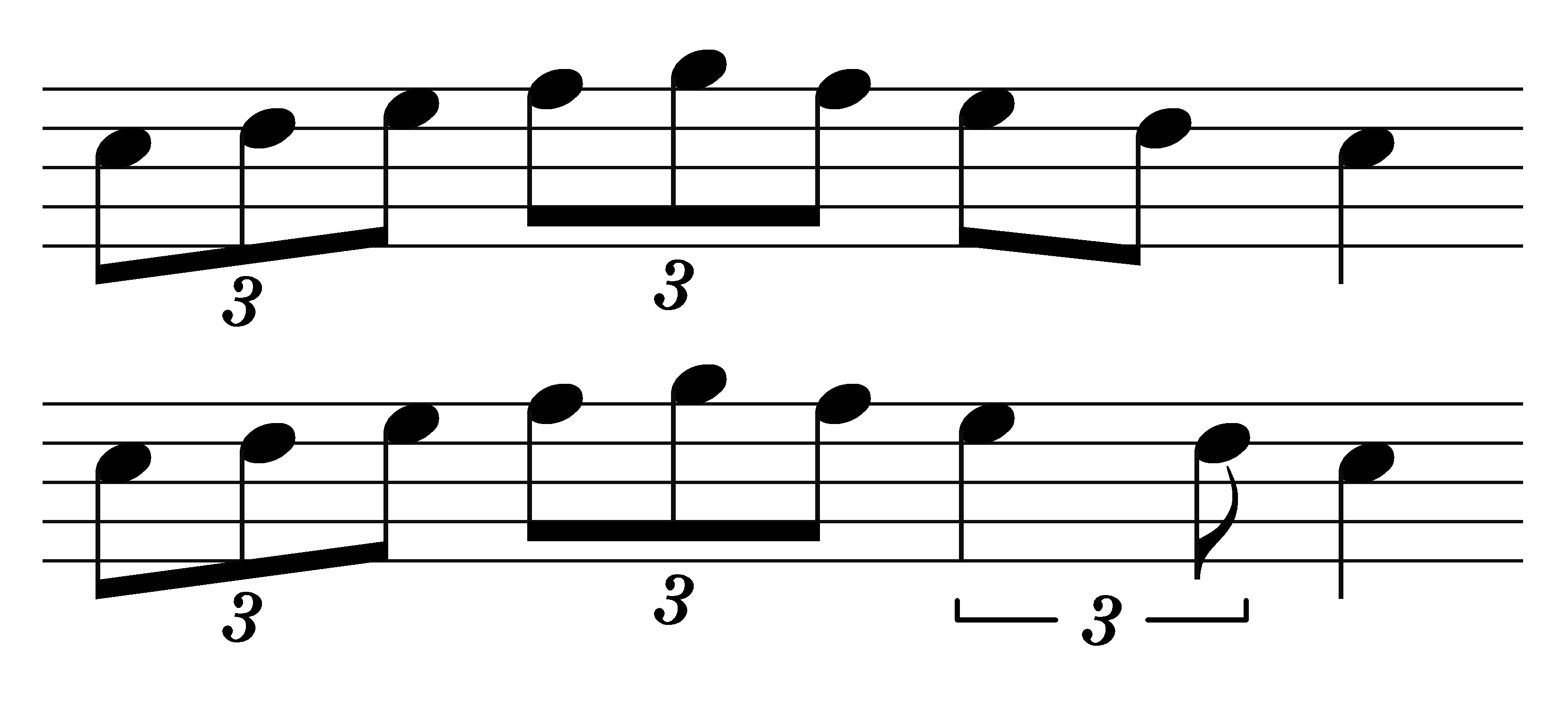 Achtelkette als Triole